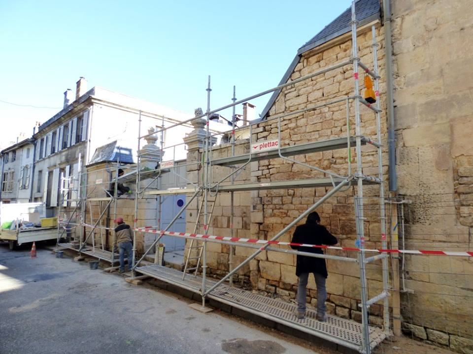 Joinville : Maison Valdruche en travaux